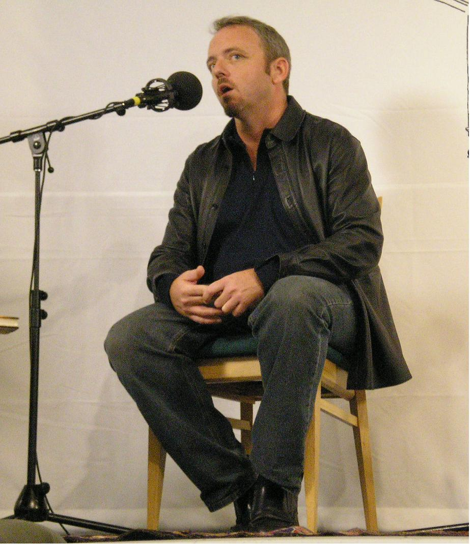 Dennis Lehane by David Shankbone